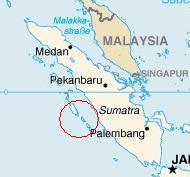 Mentawai